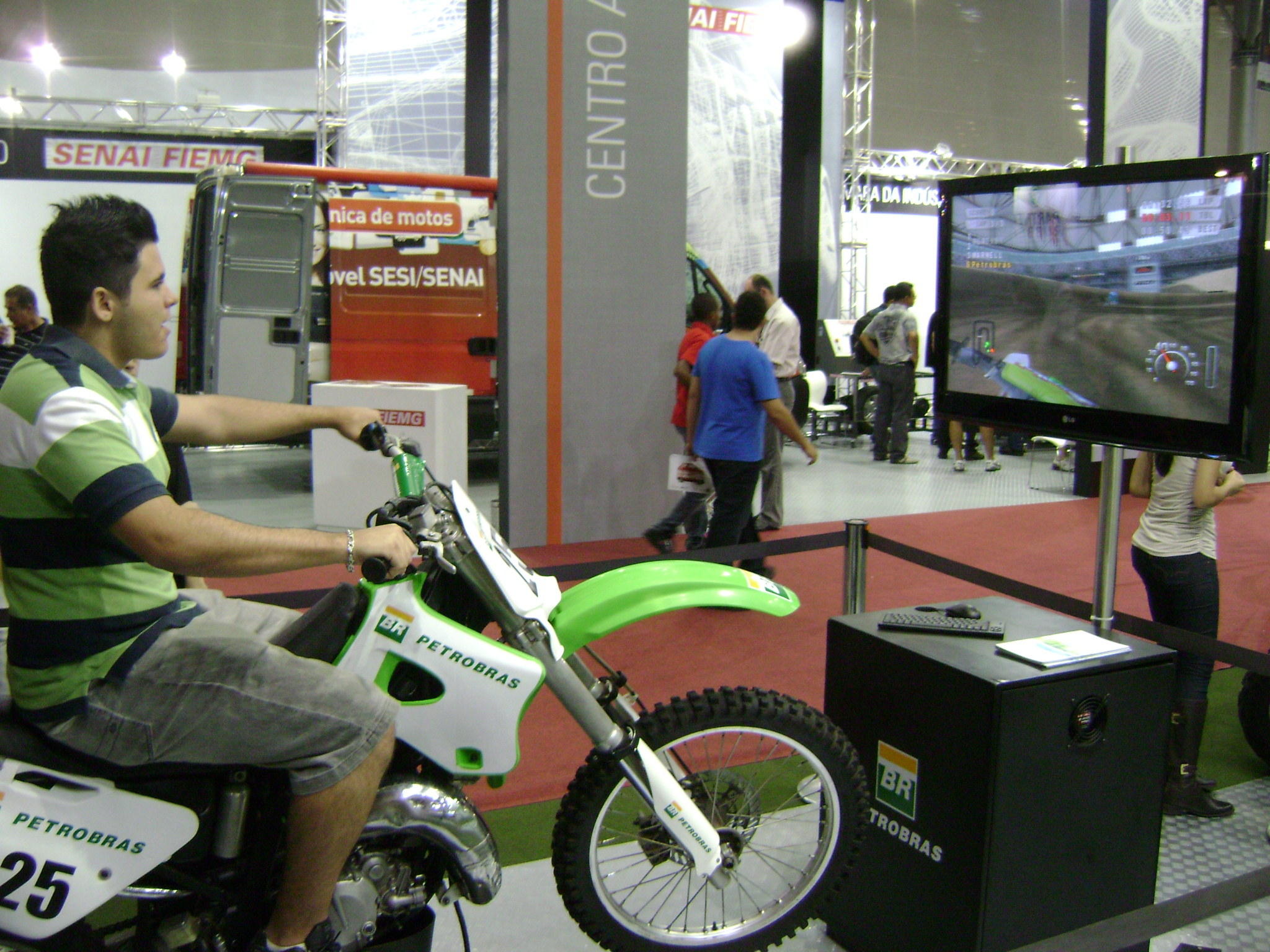 Simulador de motocicleta na Bienal do Automóvel, no Expominas, em Belo Horizonte, Minas Gerais, Brasil.